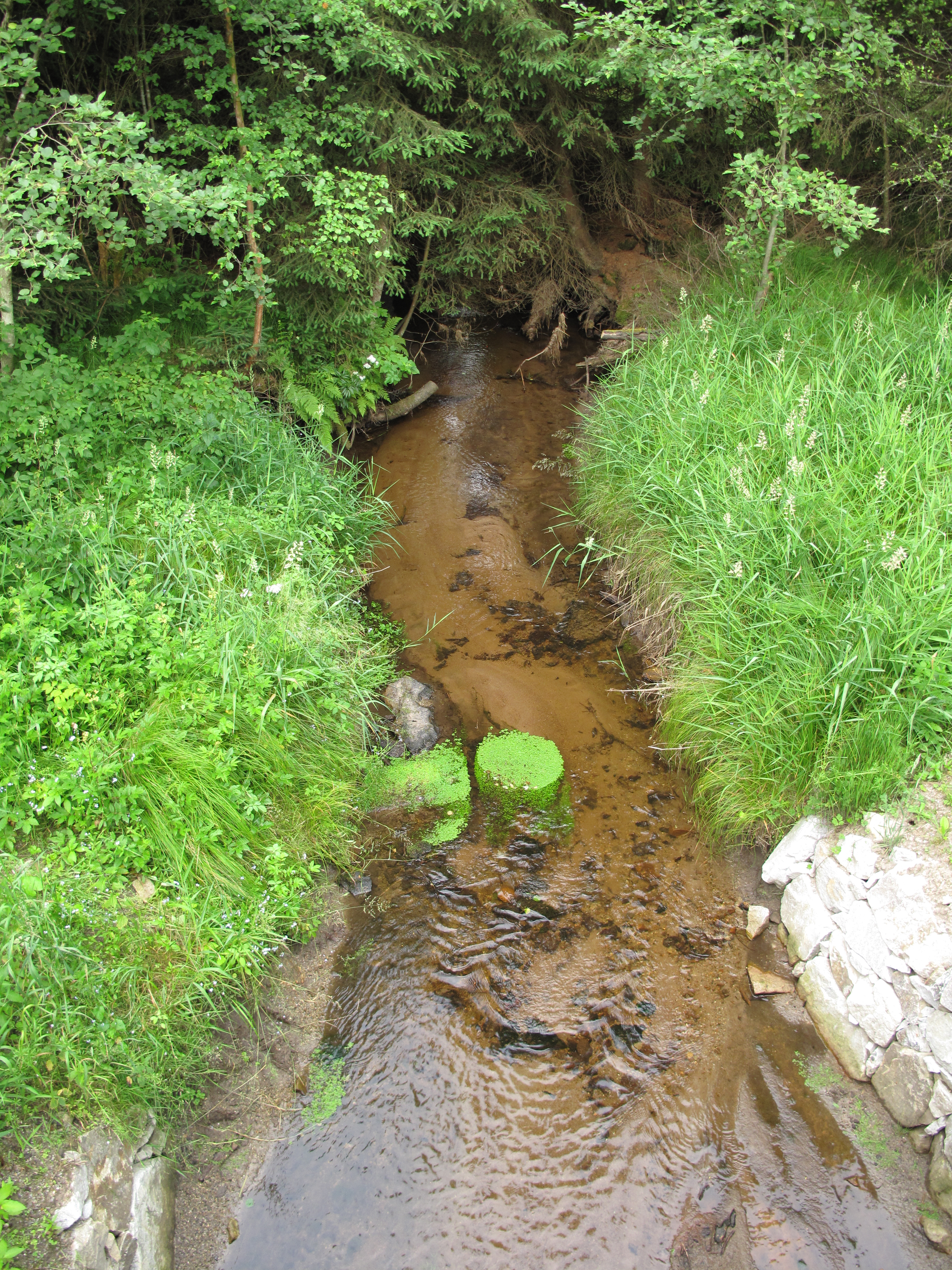 Olšinka. Okres Prachatice, Česká republika.